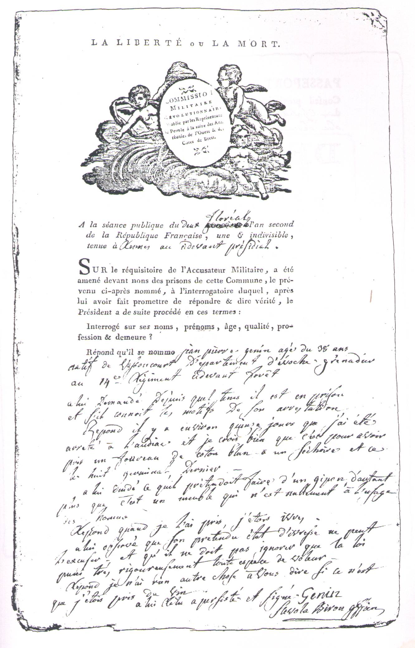 Interrogatoire d'un prévenu devant la Commission militaire d'Ille-et-Vilaine ayant siégé en Ille-et-Vilaine, dite Brutus Magnier, son président, An II et An III, ce militaire est accusé du vol d'un jupon ! Cet interrogatoire a été choisi en ce qu'il tient sur une seule page, la longueur plus habituelle étant de trois pages. Publié en annexe de Le jugement des Chouans par les commissions militaires d'Ille-et-Vilaine, 1793-1795, Hervé Tigier, Cercle généalogique d'Ille-et-Vilaine, 1988.